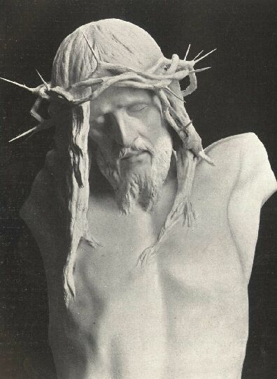 Wachsabdruck von Johann Fadrusz (1858.1903)